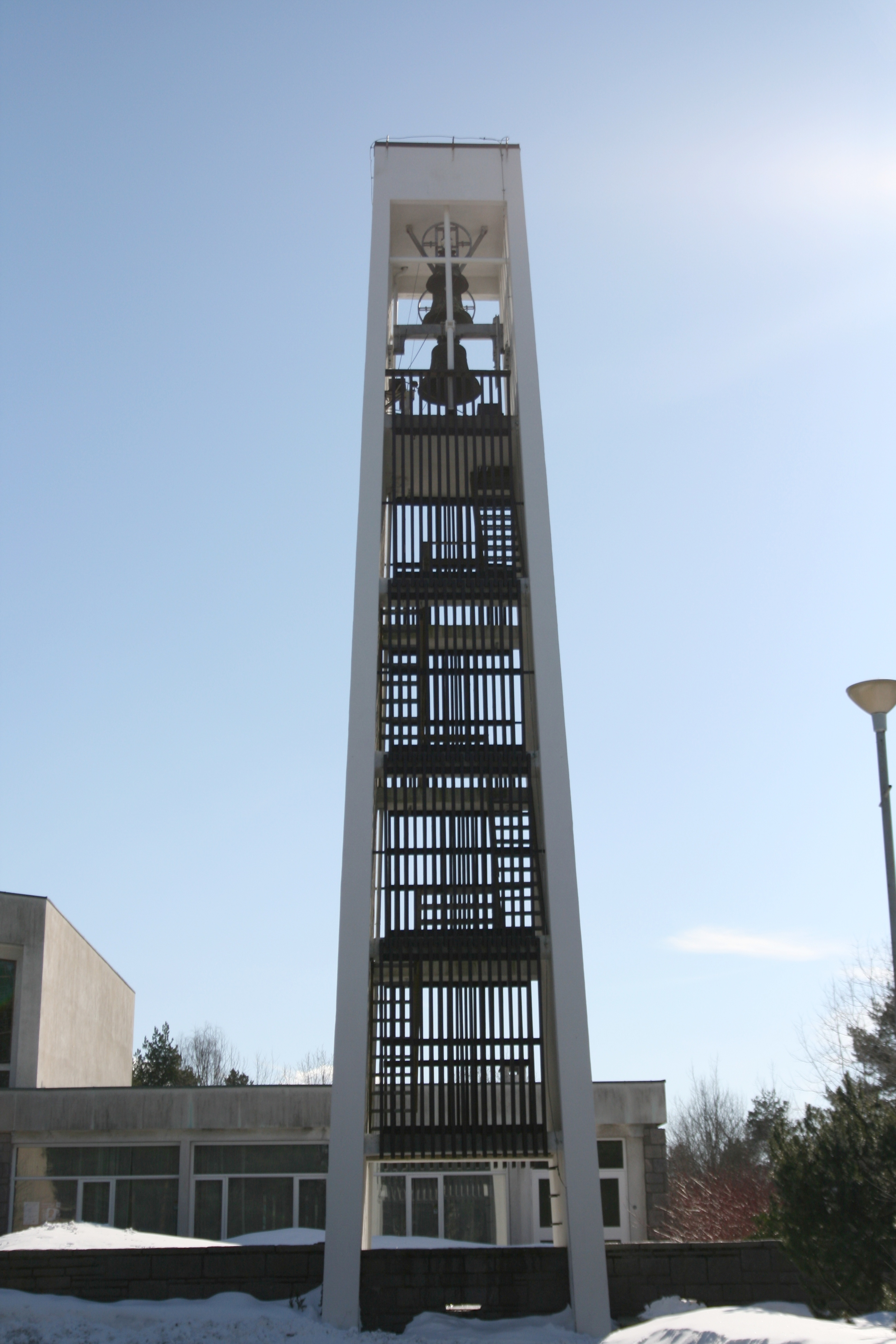 Oppsal kirke.